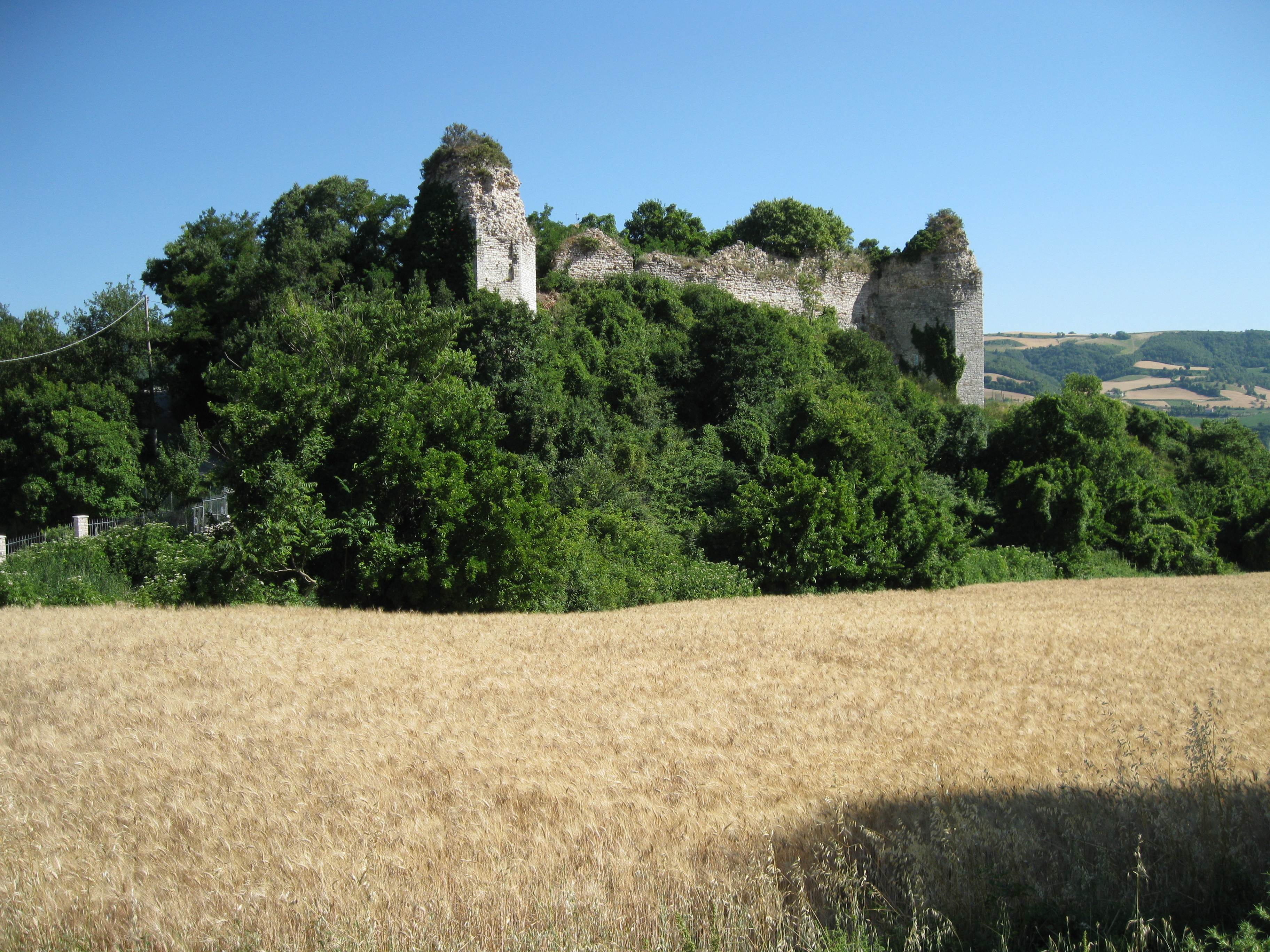 Borgen i Fossombrone, Italien